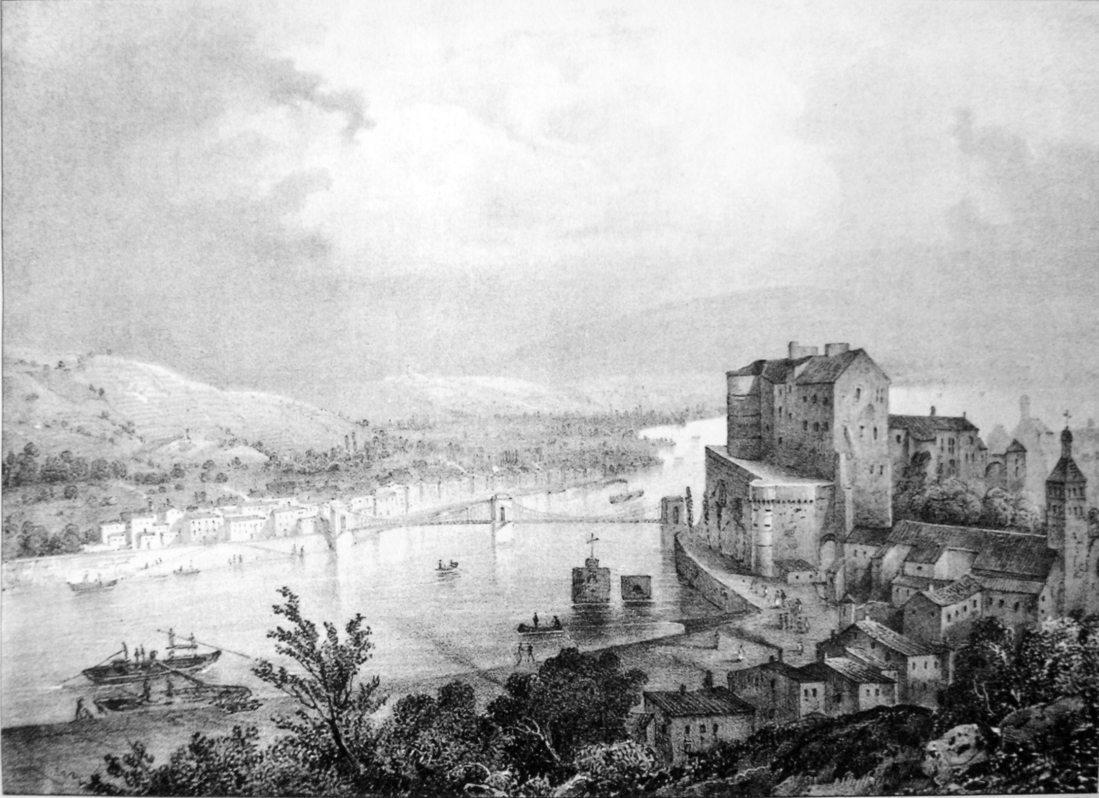 Tain et Tournon (Drome) ATTENTION ! Ce facsimilé est réalisé en appliquant des altérations avec un logiciel graphique à une copie numérique, obtenue à partir d'une prise de photo faite par un non-professionnel. Elle pourrait ne pas être parfaitement réussie.